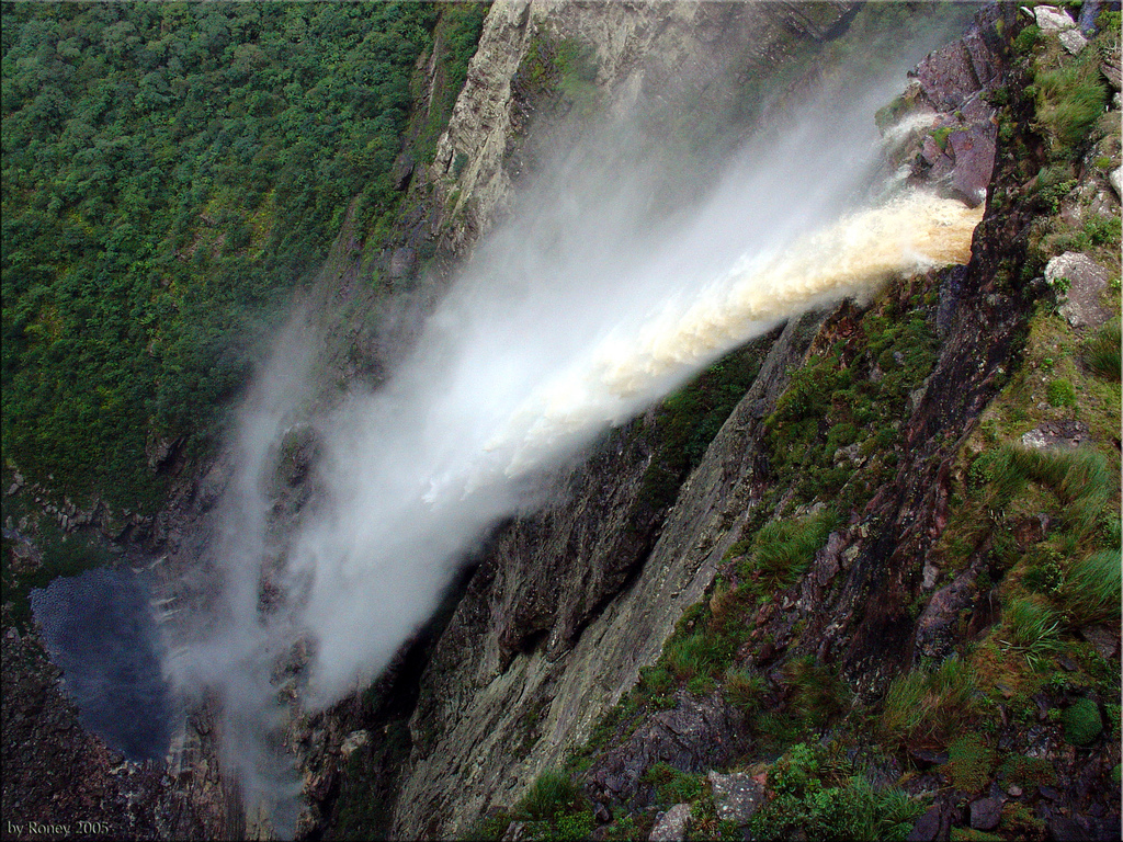 cachoeira da fumaca em toda sua extensao de 400m desde o olho ate a base. eh bastante complicado conseguir tirar uma foto assim; ao mesmo tempo que eh surpreendente, tive uma sensacao de suicidio por quase decolar com as rajadas fortissimas de vento...